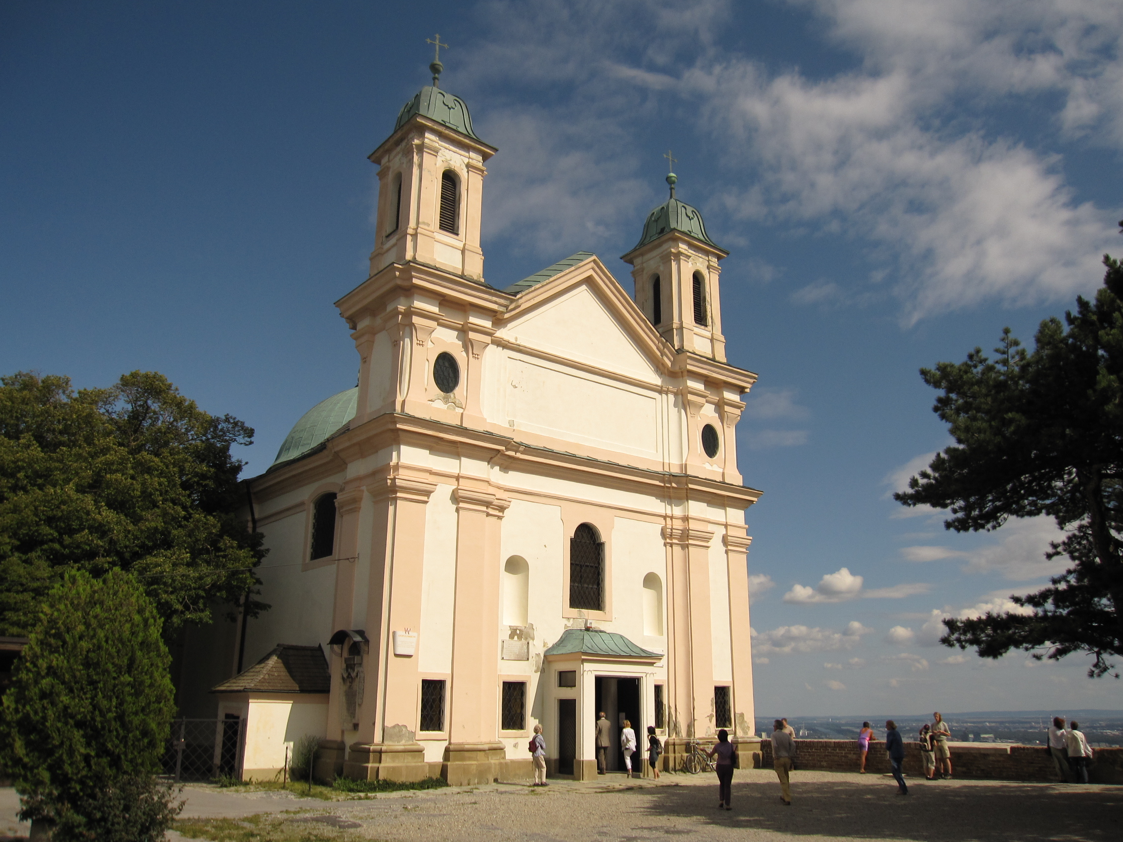 Sankt Leopold auf dem Leopoldsberg